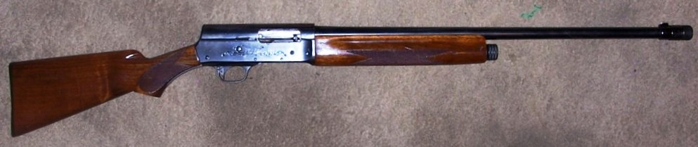 Escopeta Remington Modelo 11